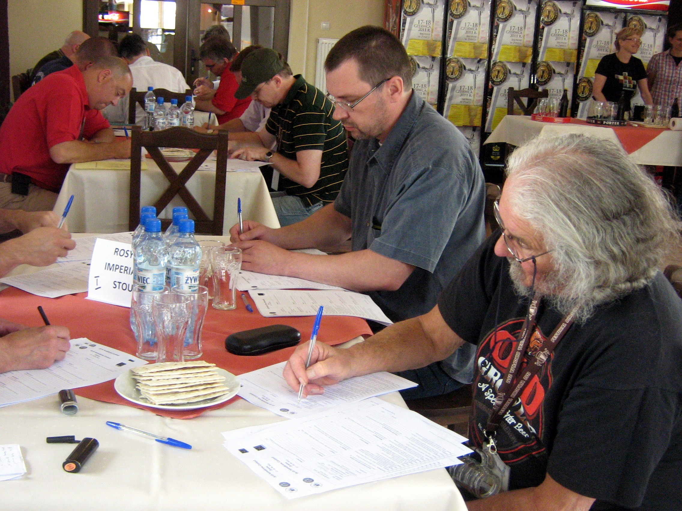 Na pierwszym planie Ian Hornsey (Royal Society of Chemistry, Anglia) i Piotr Wypych (PSPD)